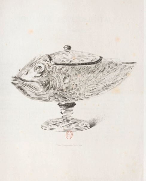 Hanap de cristal de Roche, gravure de Jules Jacquemart dans "Les gemmes et joyaux de la couronne"